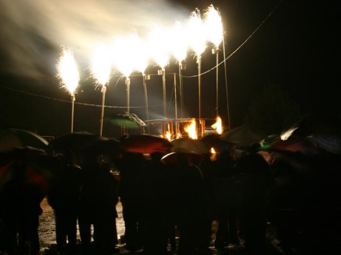 את חג החנוכה מתחילים אצלנו כל שנה במפקד אש חגיגי, הכולל מרוץ לפיד של הילדים, חנוכיה, הרבה אש וקצת זיקוקים.